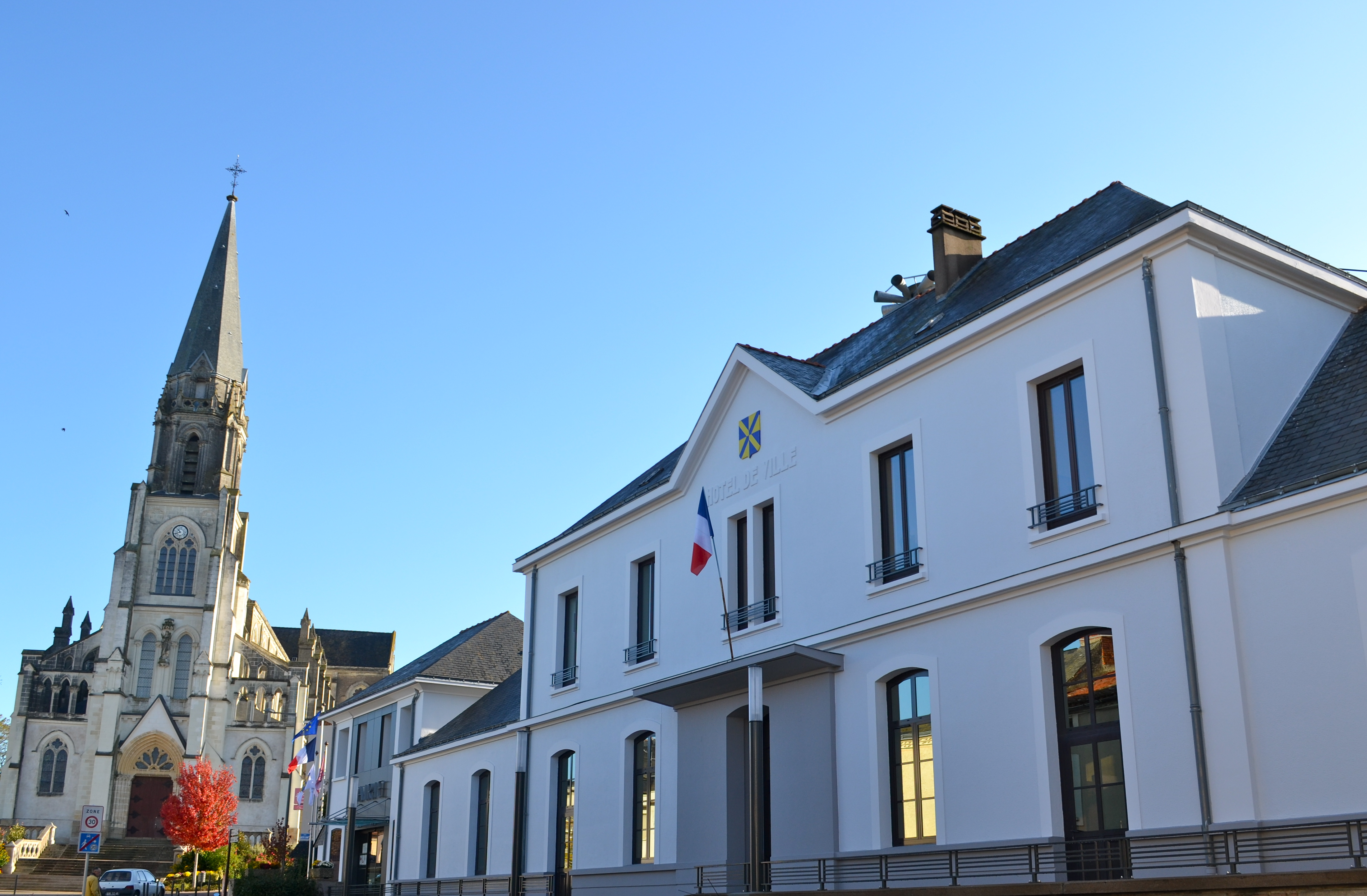 Eglise & Hôtel de ville - Beaupréau (Maine-et-Loire)